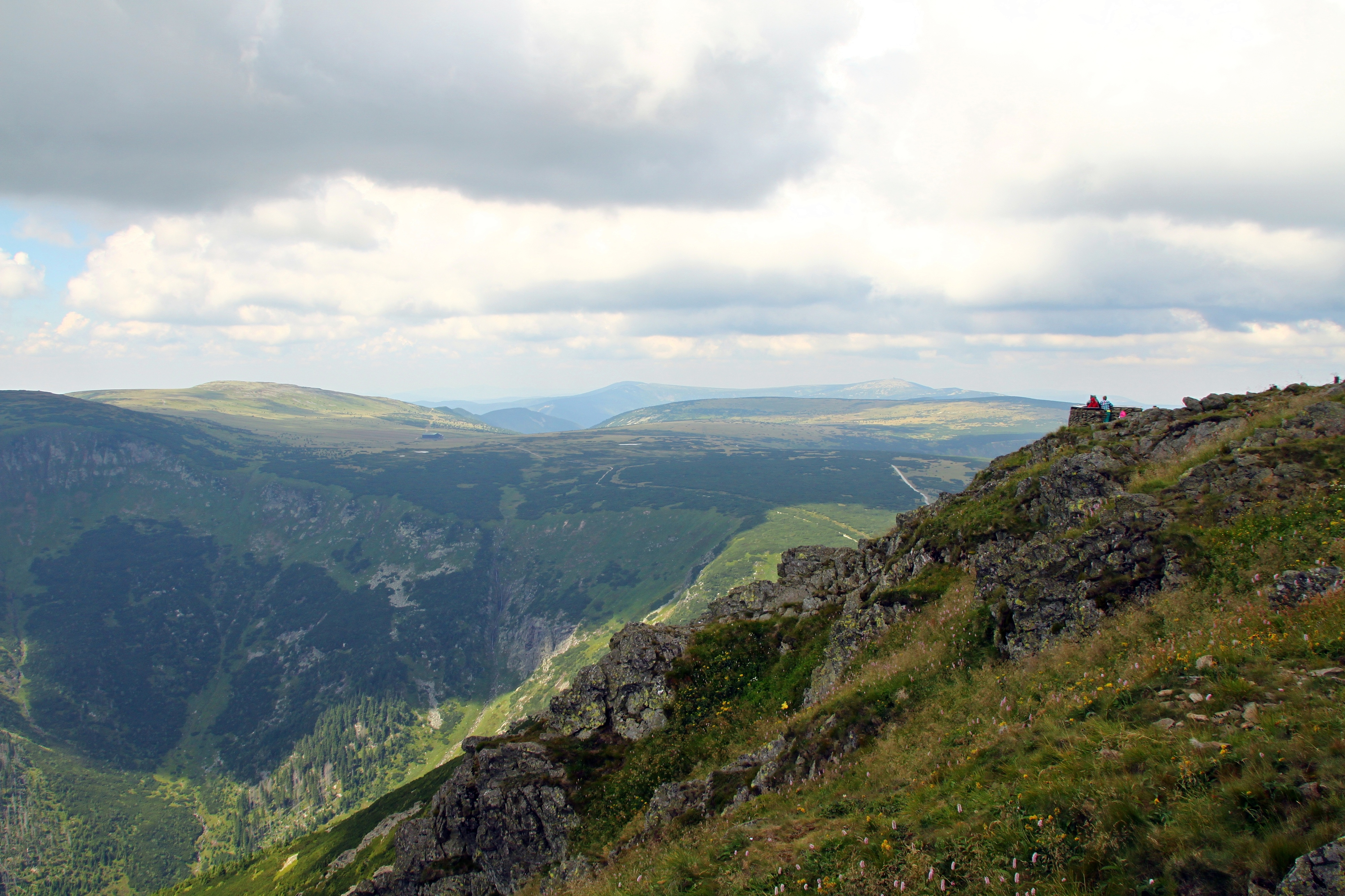 Obszar specjalnej ochrony ptaków Karkonosze. This is a photography of Natura 2000 protected area with ID PLB020007